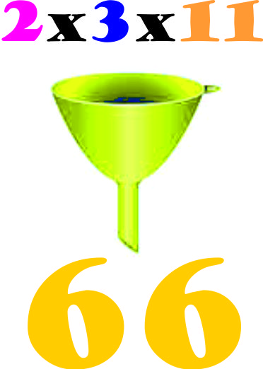 66 is a sfenical number.